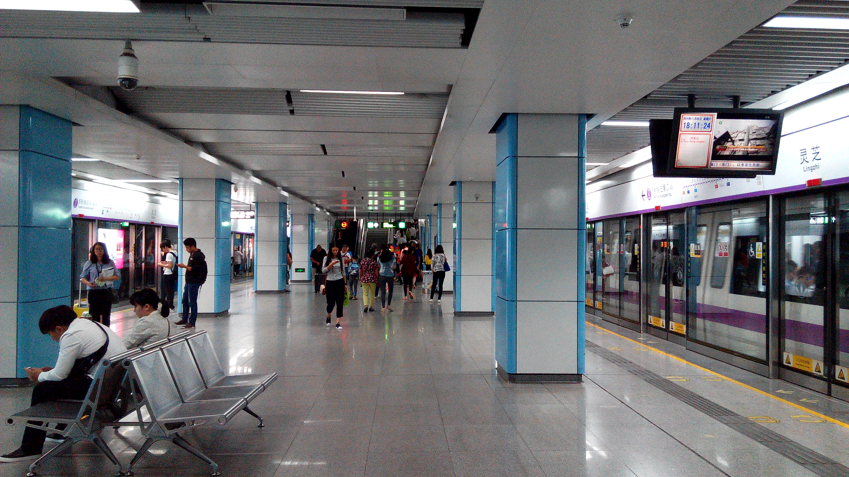 深圳地铁5号线灵芝站站台